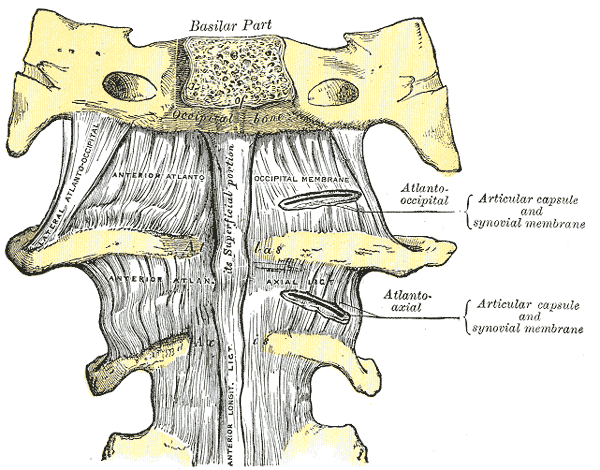 Anterior atlantoöccipital membrane and atlantoaxial ligament.